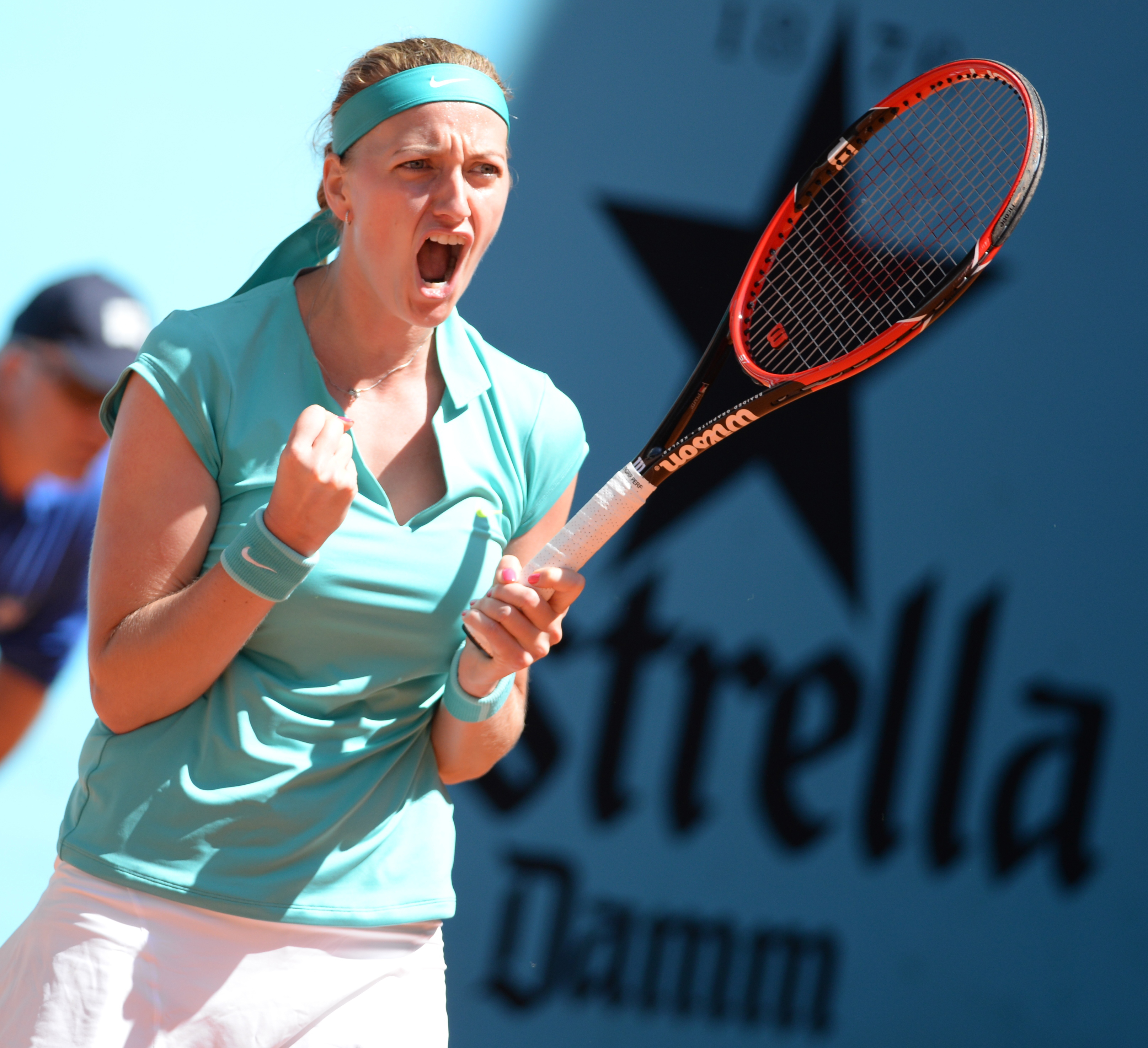 Petra Kvitova